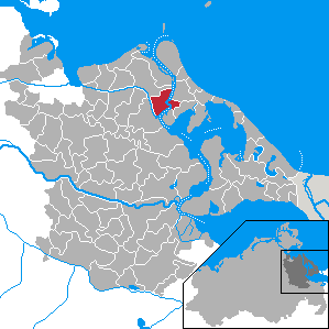 Wolgast, Landkreis Ostvorpommern, Mecklenburg-Vorpommern